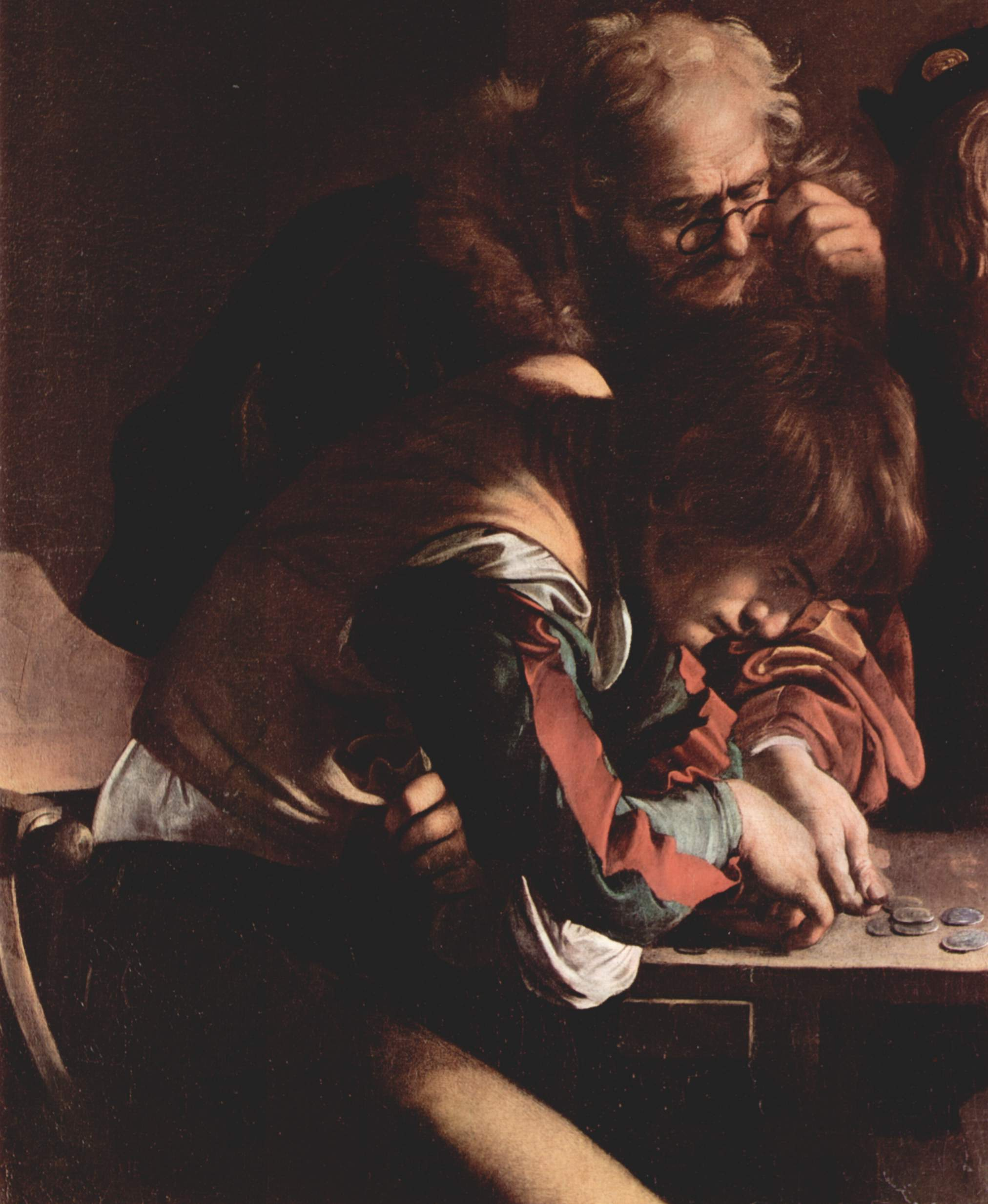 detail